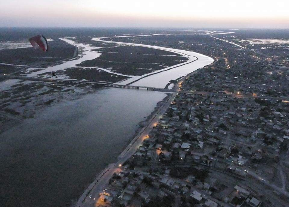 الجبايش وتلفظ أحياناً الچبايش هي مدينة عراقية ومركز قضاء تقع في جنوب العراق في محافظة ذي قار تتبعها عدة نواحي هي الحمار الذي يسميه الجغرافيون اهوار جنوب الفرات بأسمها (يسميه السكان المحليون هور السناف) وناحية الفهود تقع المدينة بالقرب من منطقة الأهوار الغربية. الشجرة التين والأغنام